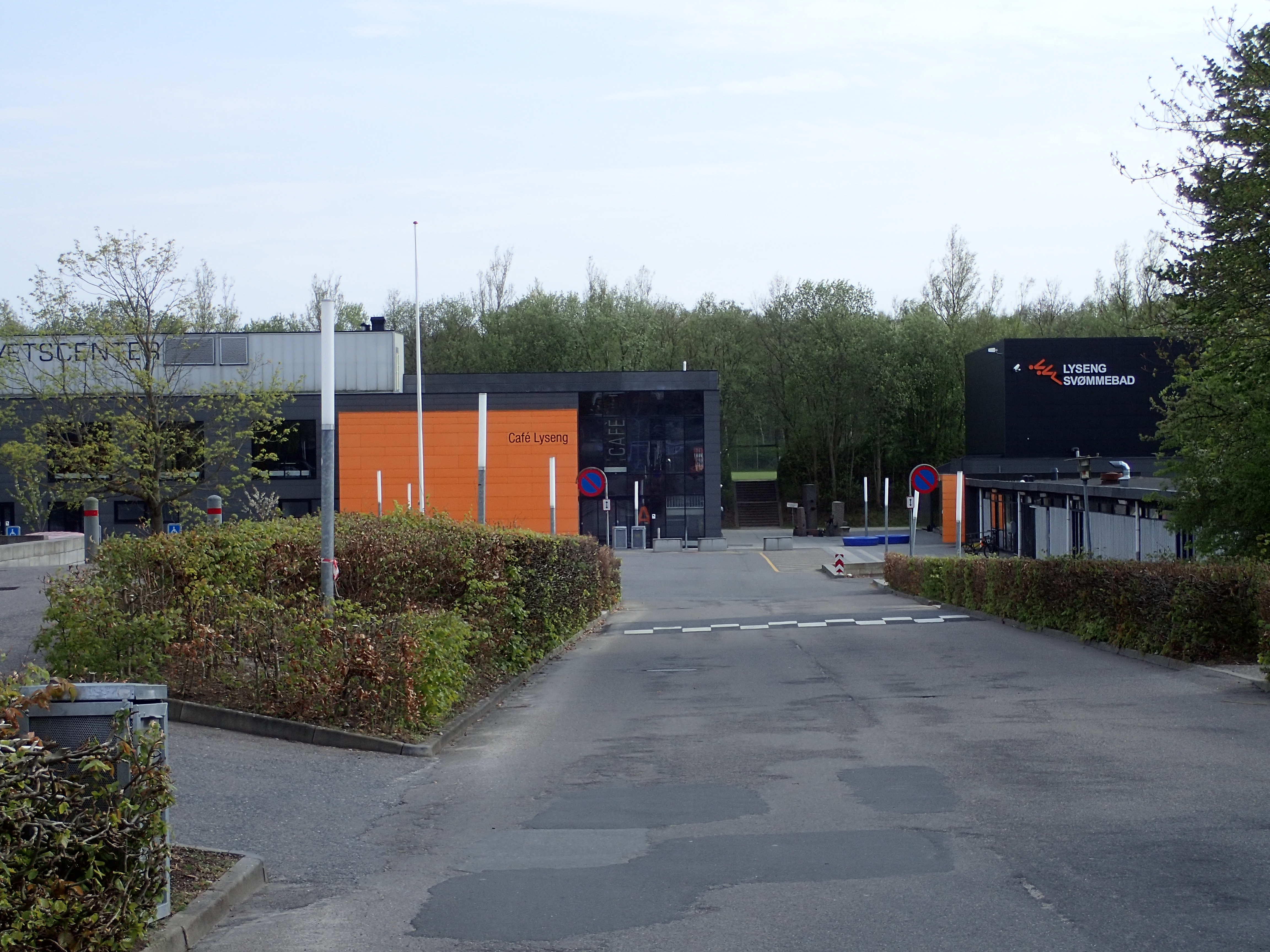 Lyseng Idrætscenter.